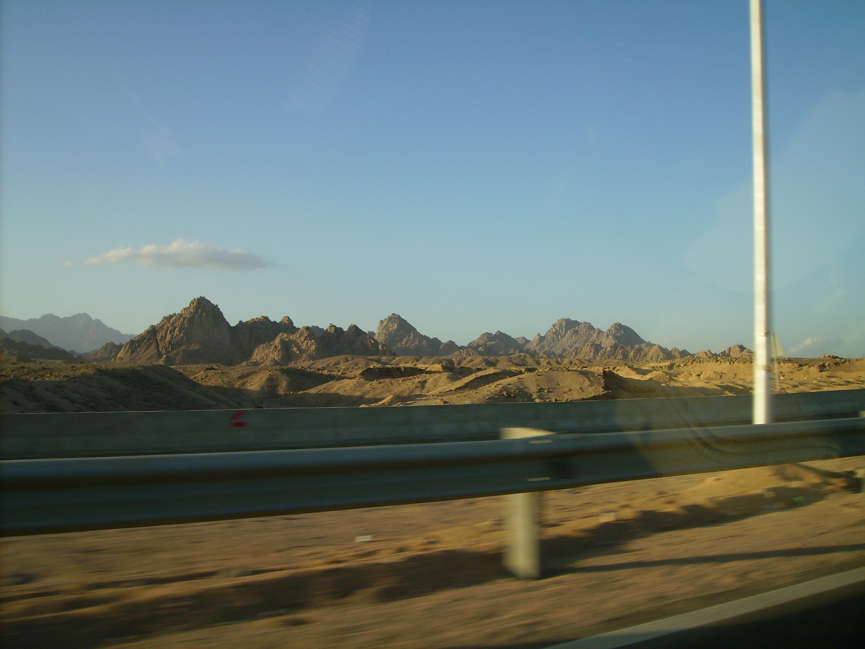 Вид на годы с шоссе в Шарм-эш-Шейхе